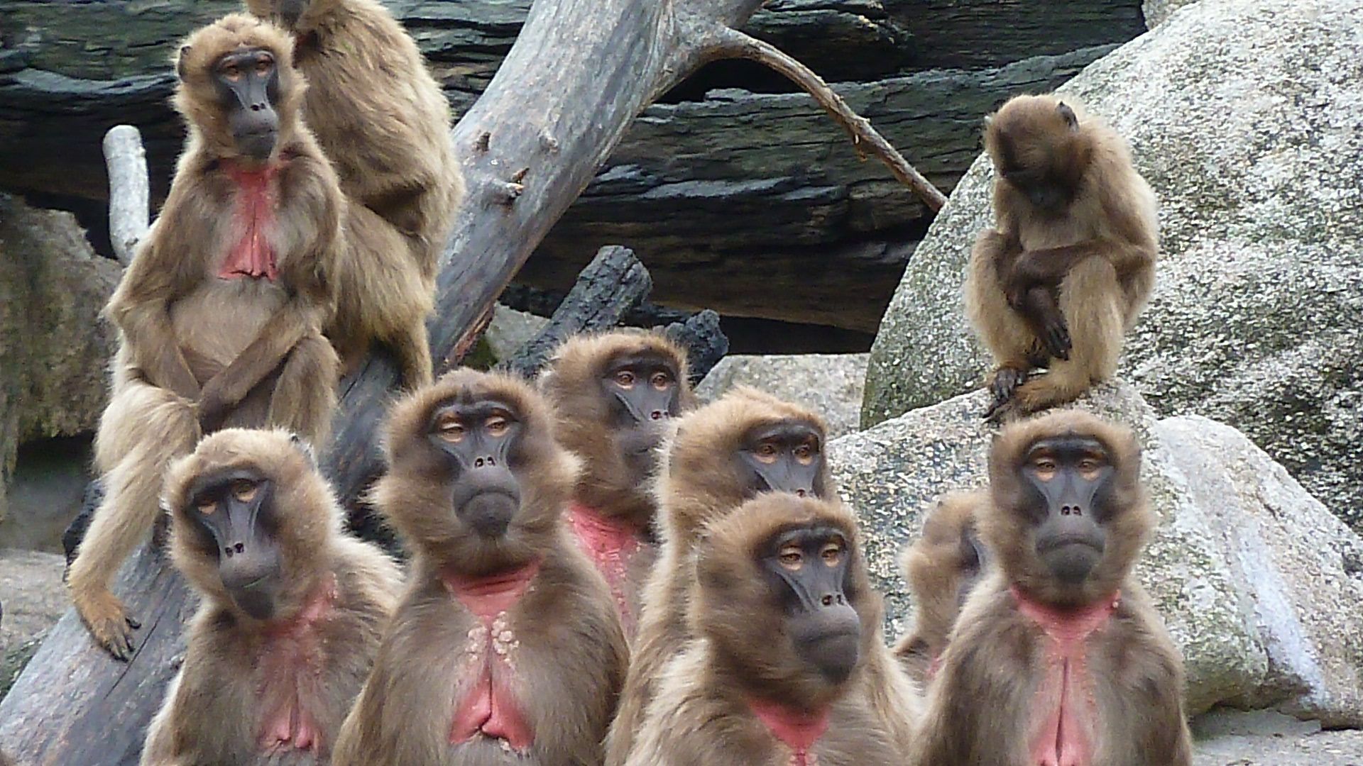 Dschelada in der Wilhelma